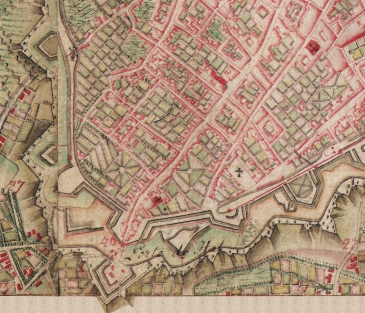 Extrait de la carte de Ferraris n° 76